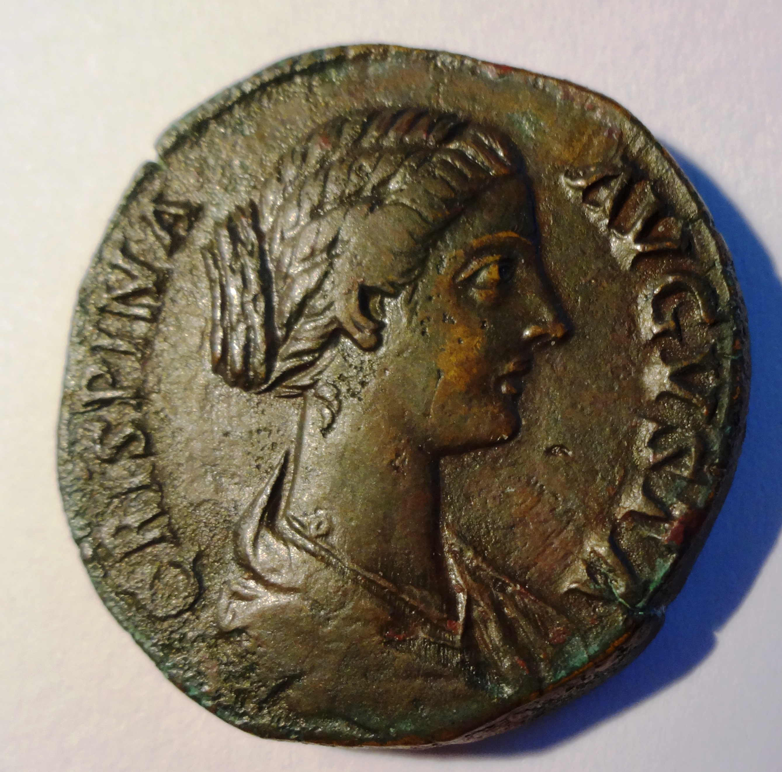 Crispina auf einem Sesterz, Kampmann Nr. 42.23